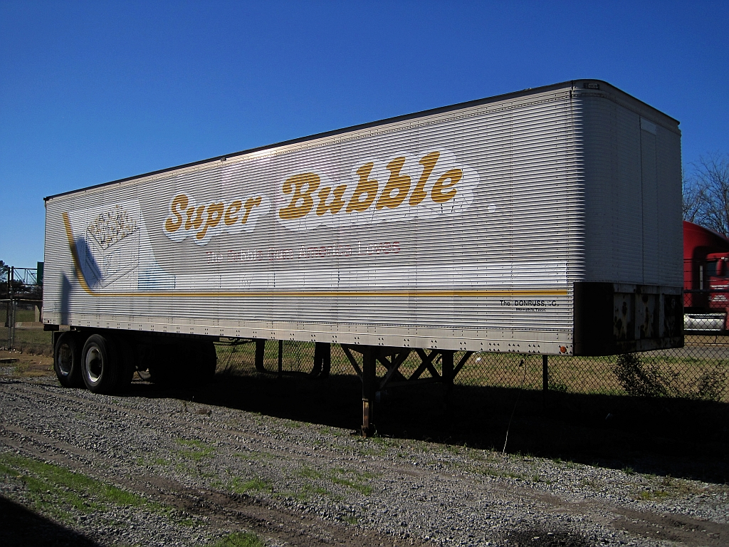 Memphis, Tennessee Super Bubble trailer